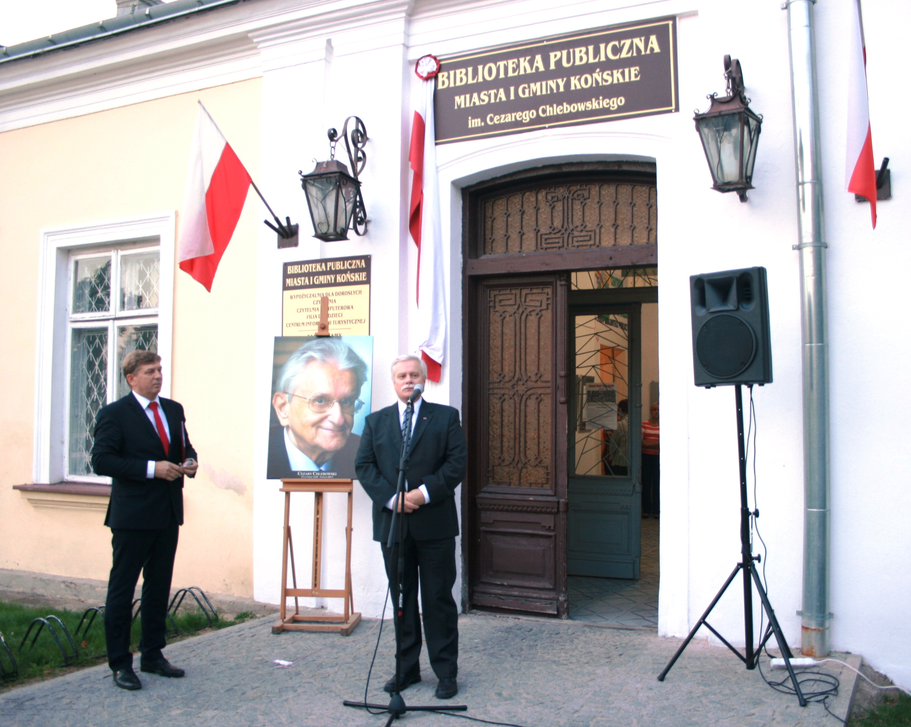 Odsłonięcie nowej tablicy Biblioteki Miejskiej w dniu 30 sierpnia 2014 roku w związku ze zmianą nazwy tej biblioteki na "Biblioteka Publiczna Miasta i Gminy Końskie im. Cezarego Chlebowskiego". Uroczystość w ramach Koneckiego Września. Przemawia Tomasz Chlebowski, syn Cezarego Chlebowskiego, po lewej – dyrektor biblioteki – Dariusz Kowalczyk. Biblioteka znajduje się w Pałacu Tarnowskich